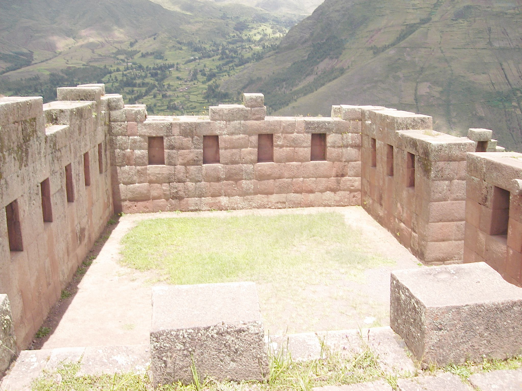 Foto tirada por mim, em Pisac.